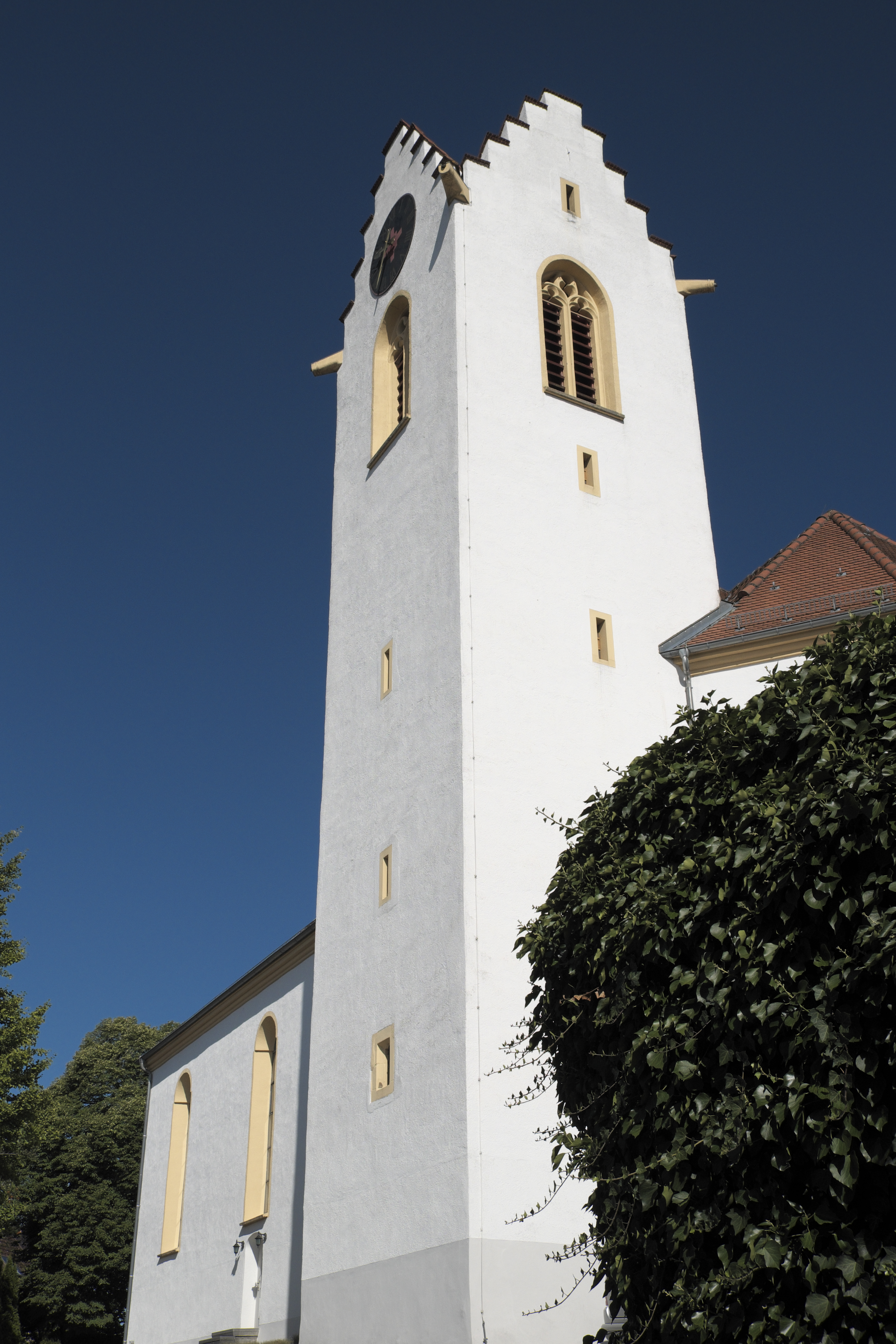 Katholische Pfarrkirche St. Nikolaus in Aach (Hegau) im Landkreis Konstanz (Baden-Württemberg/Deutschland), Turm